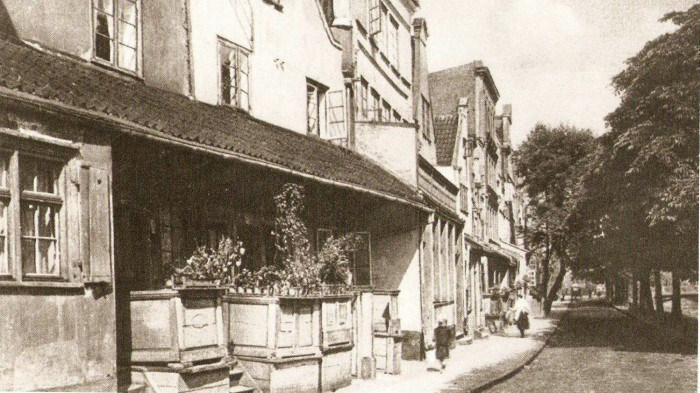 Gdańsk, ul. Karpia.